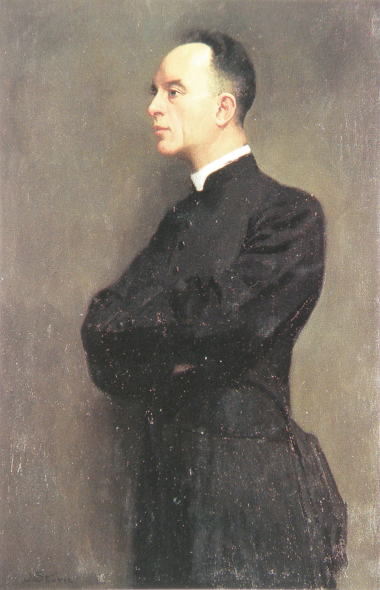 Portrait de Rodolphe Hoornaert (décennie 1930). Béguinage de Bruges. Oeuvre de José Storie.